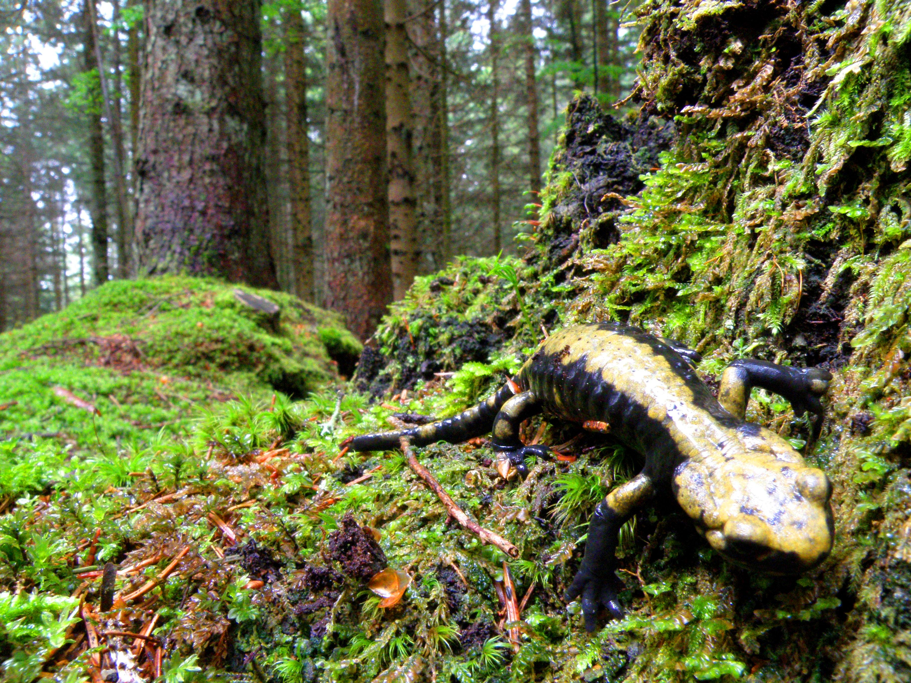 Salamandra di Aurora (Salamandra atra aurorae). Altopiano di Vezzena (TN)